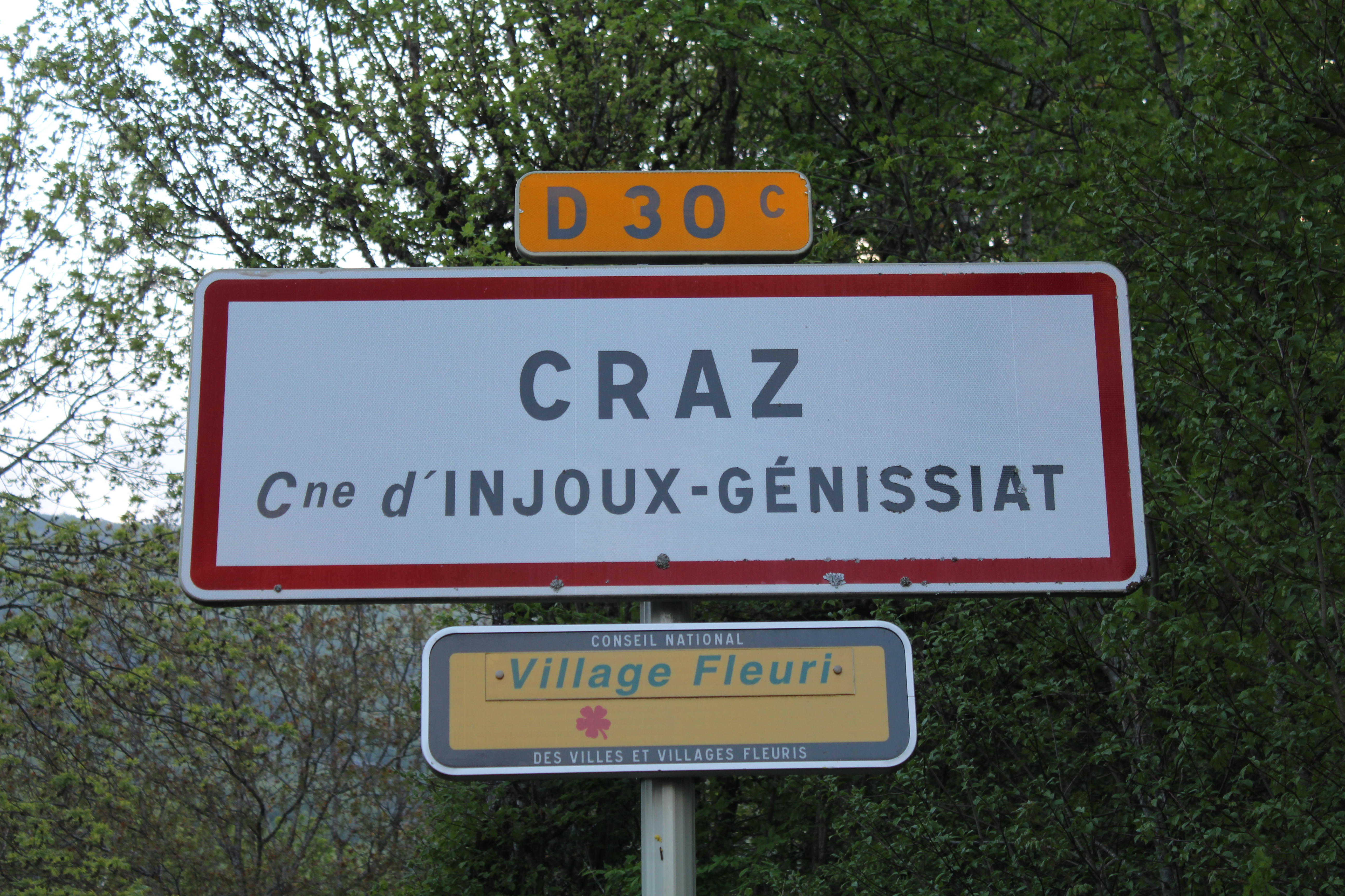 Panneau d'entrée dans Craz, Injoux-Génissiat.